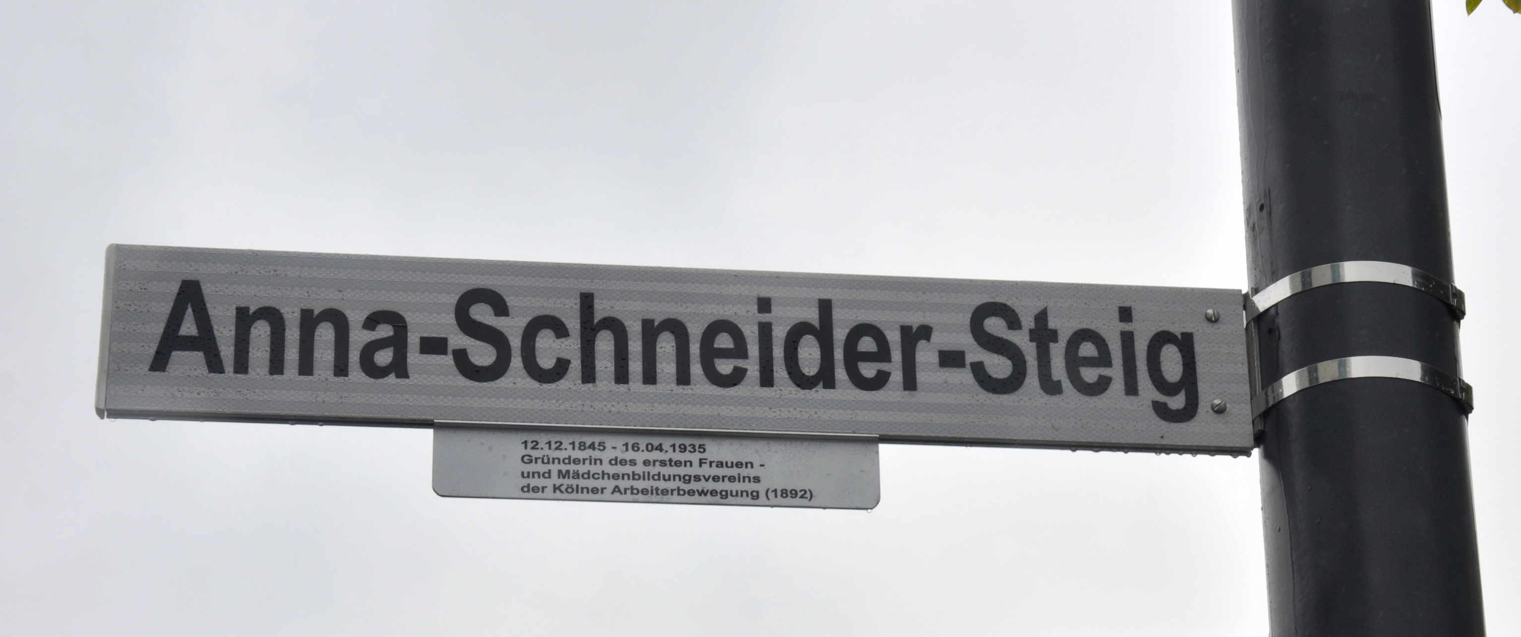 Enthüllung des Straßenschildes "Anna-Schneider-Steig" im Rheinhauhafen Köln. Bürgermeisterin Elfi Scho